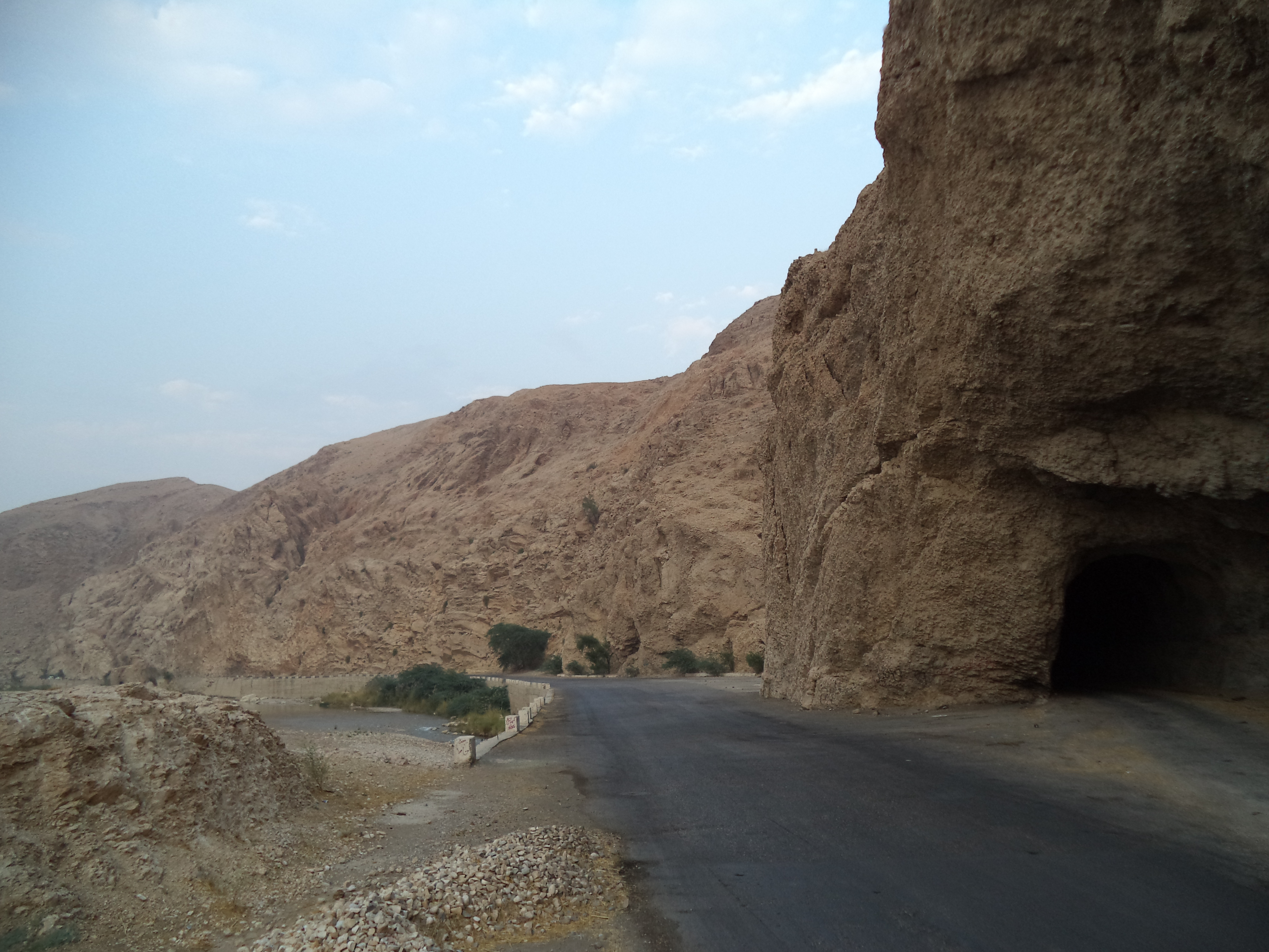 Tunnel in Bolan